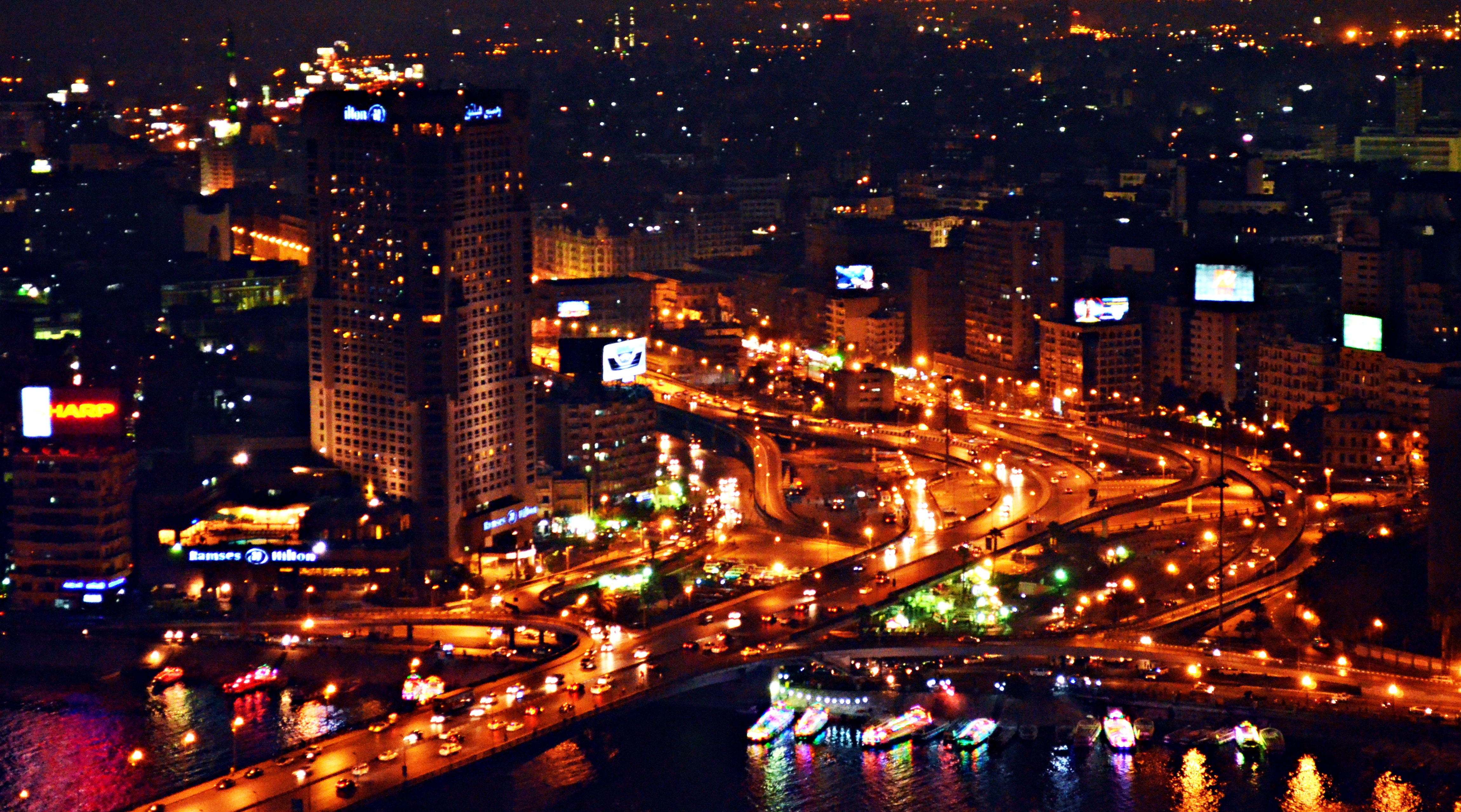 كوبري 6 أكتوبر وفندق رمسيس هيلتون بالقاهرة، مصر